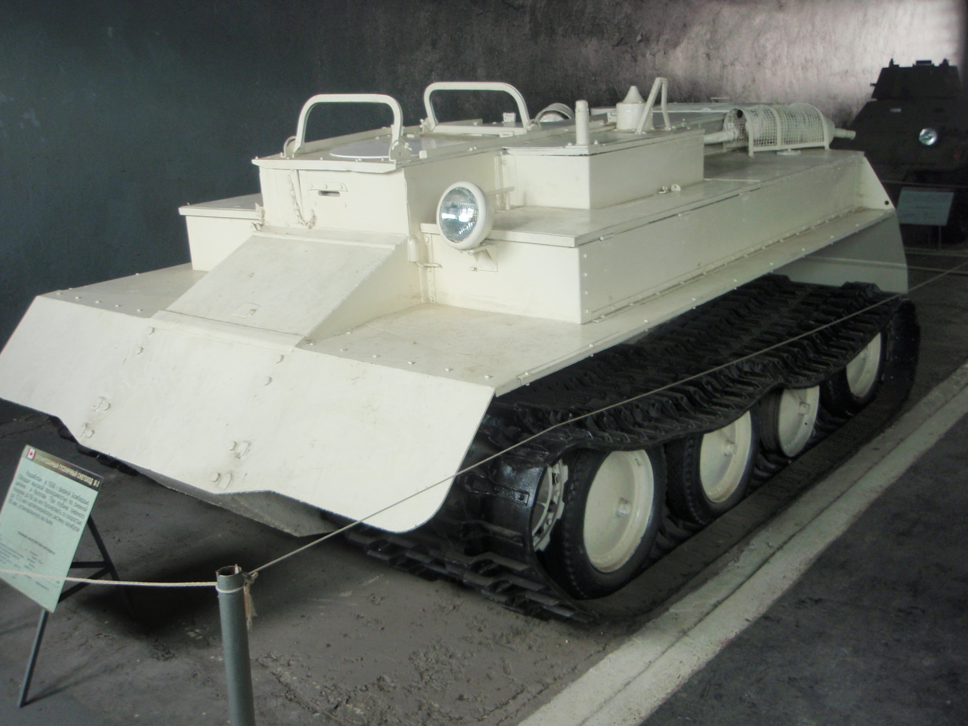 Канадский бронированный гусеничный снегоход B-3 в Кубинке